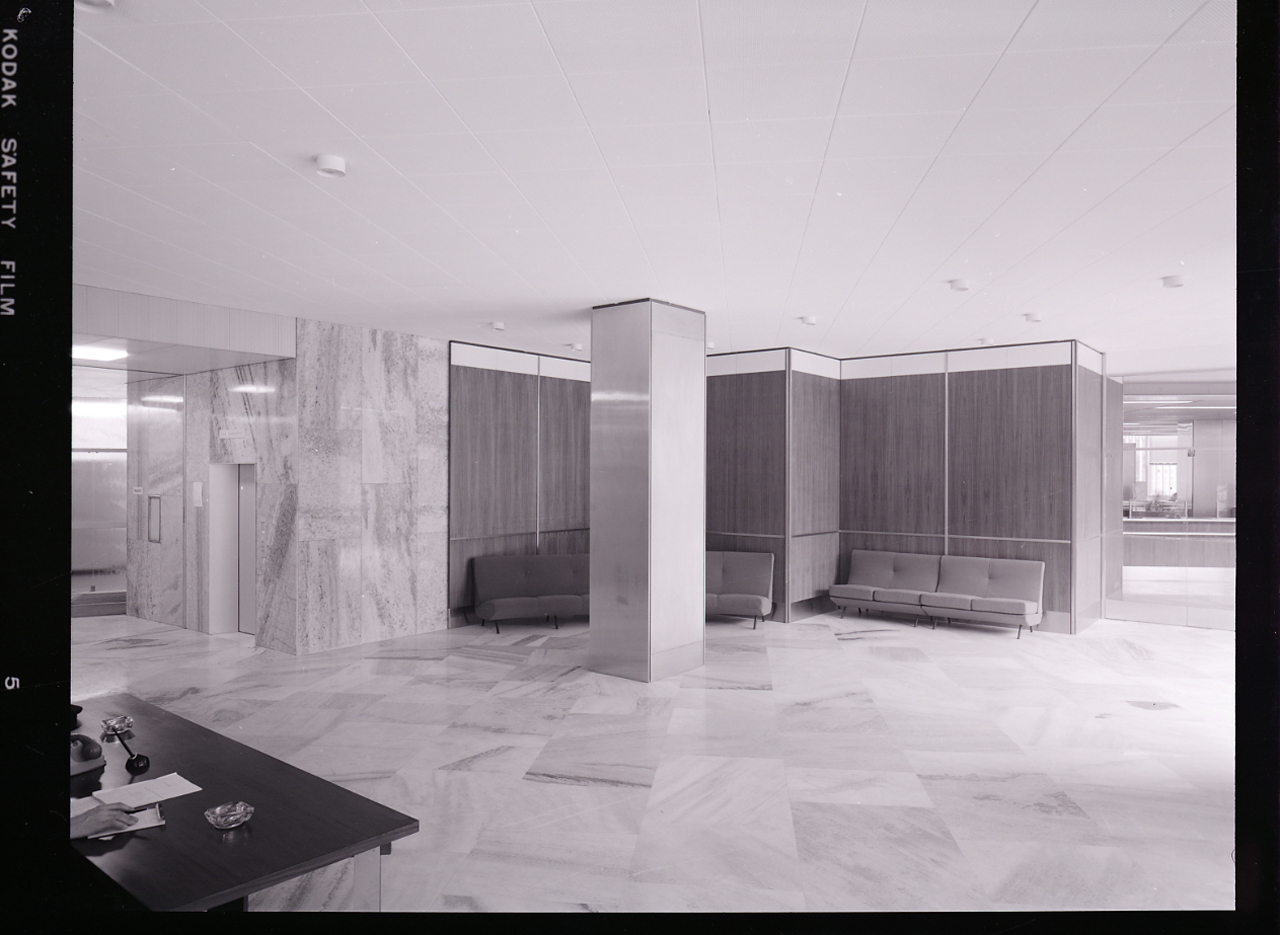 Servizio fotografico : Milano, 1962 / Paolo Monti. - Buste: 14, Fototipi: 14 : Negativo b/n, gelatina bromuro d'argento/ pellicola ; 10x12. - ((Serie costituita da 14 buste sciolte di negativi identificati con una doppia numerazione (da 44516 a 44527): 24684, 2485, 24686, 24687, 24688, 24689, 24690, 24691, 24692, 24693, 24694, 24695, 24696, 24697. - Sulla busta identificata con il n. 24686 iscrizione didascalica manoscritta a penna. - La suddetta serie è contenuta nella scatola G24601-24800, formato 18x24, e identificata con la lettera "A", manoscritta a matita sul coperchio in basso a destra. - Nel 1962 la sede della compagnia fu spostata da Via Manzoni 38 a Corso Italia 23 all'angolo con via Santa Sofia. - Occasione: Documentazione del nuovo edificio in Corso Italia 23 e per la pubblicazione: Notarnicola Vittorio (a cura di), "Benvenuti: Riunione Adriatica di Sicurtà", l'assicuratrice italiana, Milano, Amilcare Pizzi, 1962. - Fonte: Rubrica di Paolo Monti: Archivio fino 1-4-1961/ 31-3-1963 (1961-1963), presso Archivio Paolo Monti. - Fonte: Monografia di Notarnicola, Vittorio (a cura di): Benvenuti: Riunione Adriatica di Sicurtà, l'assicuratrice taliana, Milano, Amilcare Pizzi (1962/05/09). Grafica di Albe Steiner